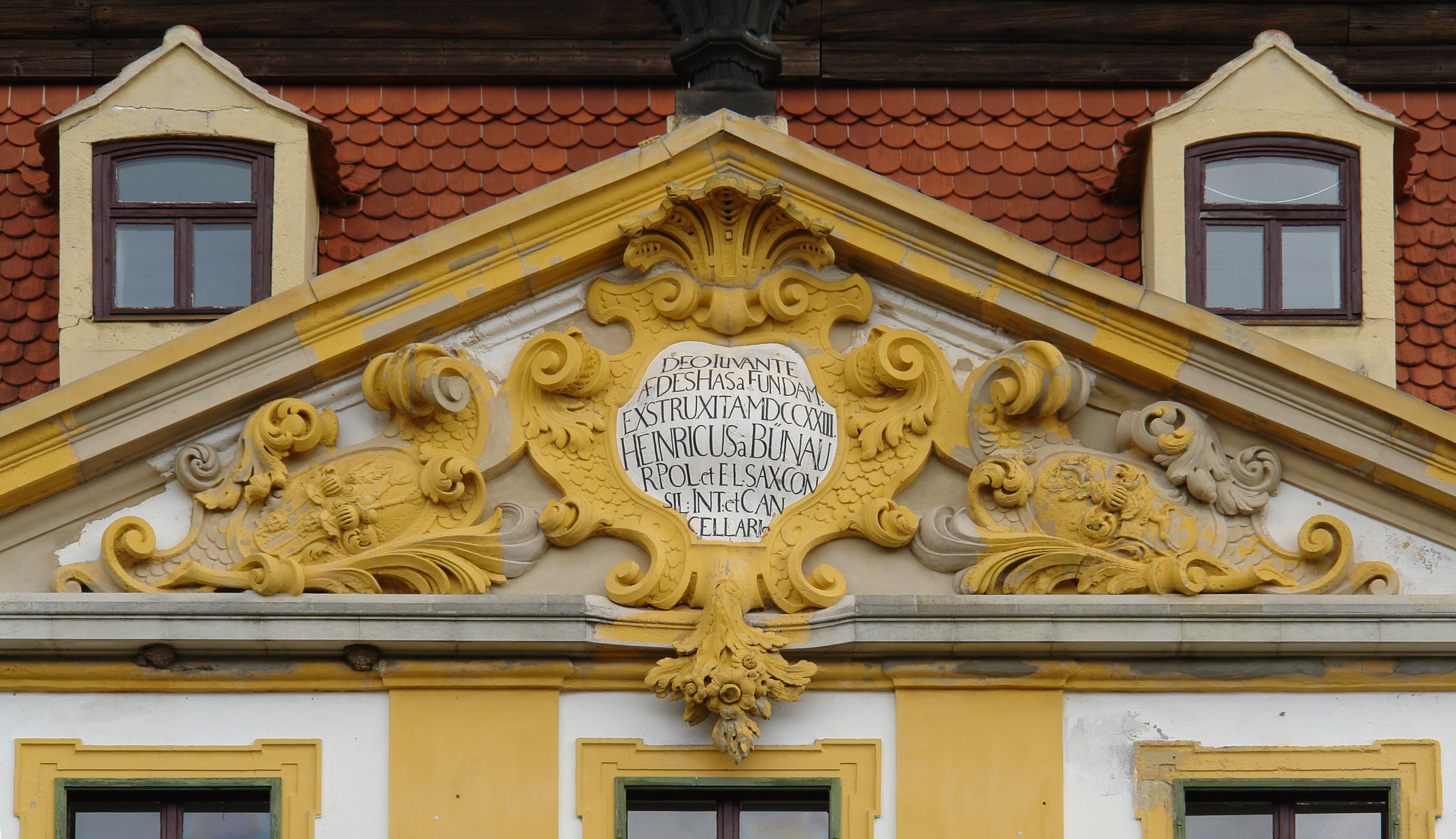 Dachgiebel am Barockschloss Seußlitz Transkription des Lateinischen, Abkürzungen aufgelöst: Deo iuvante aedes has a fundam(ento) exstruxit a(nno) MDCCXXIII Heinricus a Bünau, R(egis) Pol(oniae) et El(ectoris) Sax(oniae) consil(iarius) int(imus) et cancellari(us). Übersetzung: "Mit Gottes Hilfe baute dieses Haus im Jahr 1723 von Grund auf Heinrich von Bünau, Geheimer Rat und Kanzler des Königs von Polen und Kurfürsten von Sachsen"